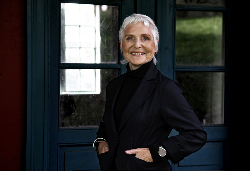 Portrait d'Herbjørg Wassmo